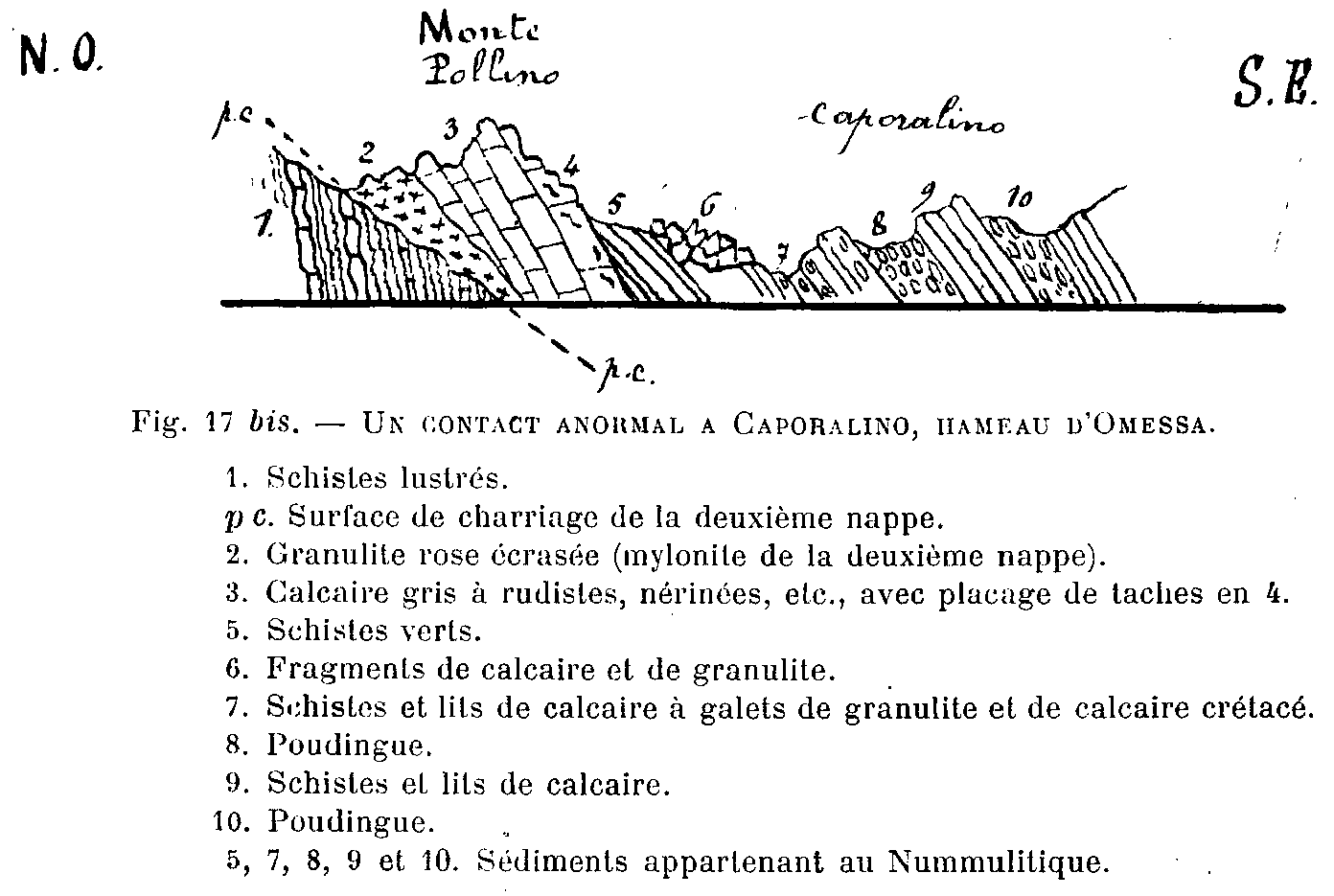 Omessa, Centre Corse - Coupe du Monte Pollino à Caporalino, Fig. 17 de l'ouvrage Géologie de la Corse - Bulletin de la Société des Sciences historiques et naturelles de la Corse 1917-01